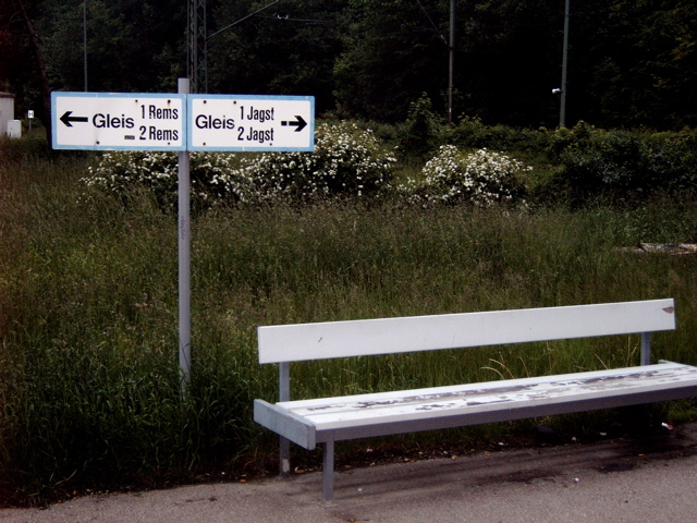 Bahnhof Goldshöfe der Riesbahn und Oberen Jagstbahn: Gleishinweis (2006)